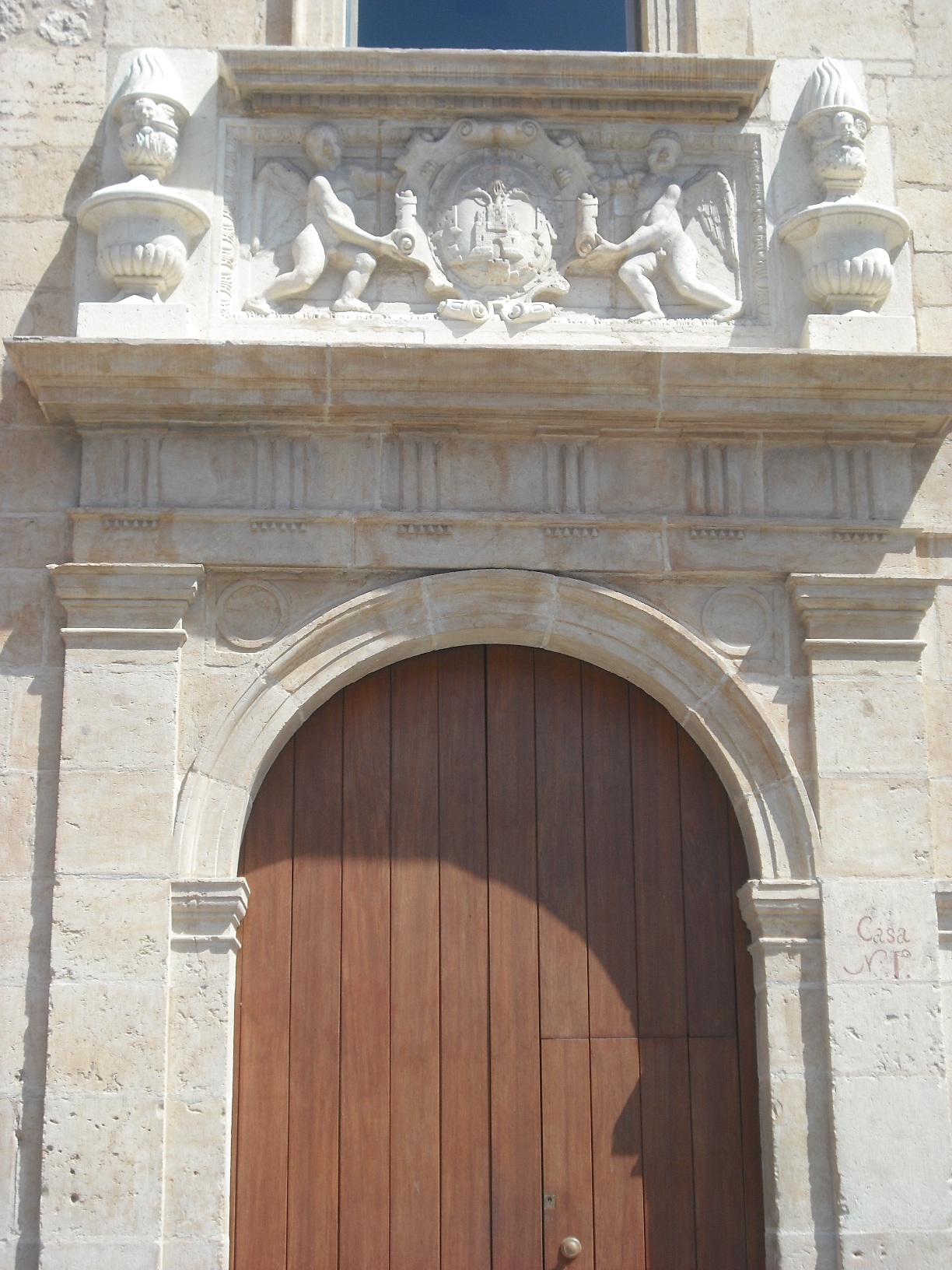 Porta principal de Ca la Vila, antiga seu del Consell i ajuntament.